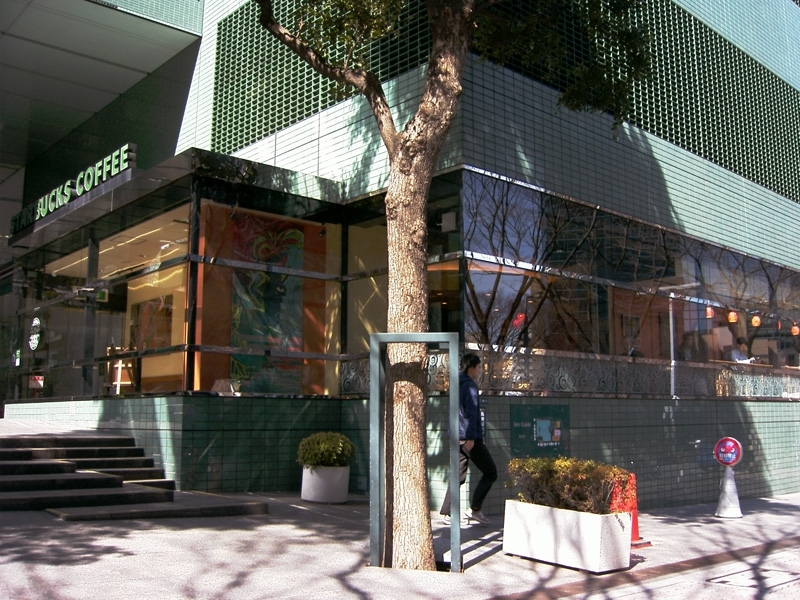 Starbucks-Shinjuku Japan